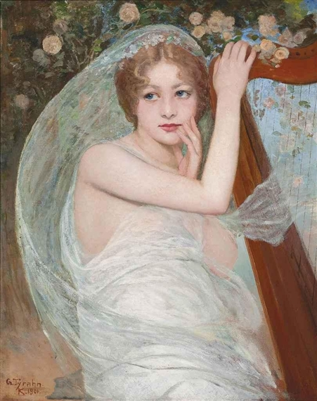 Das Erblühen